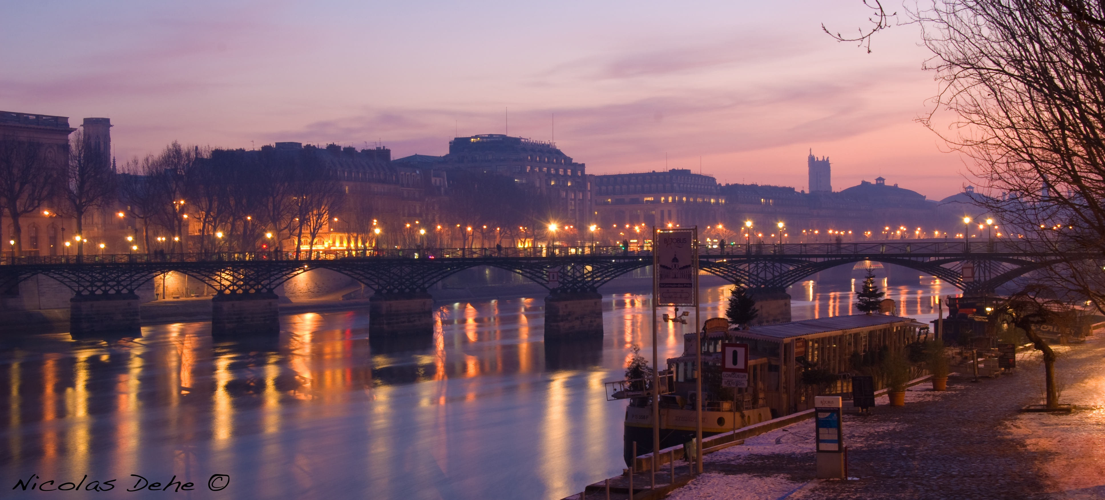 7h30 le 11 Janvier 2009, vu du pont des arts et du levé de soleil.